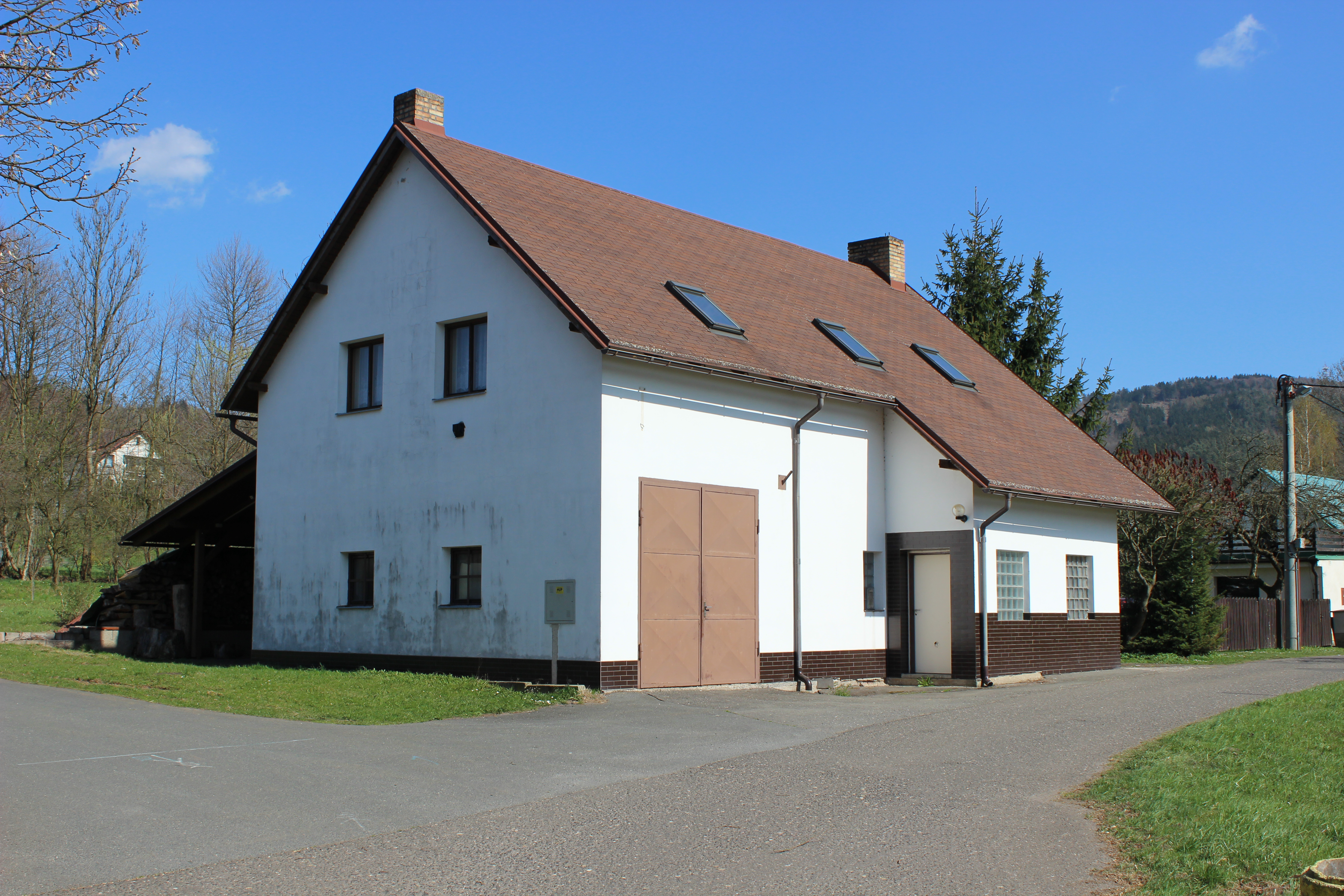 Hasičská zbrojnice ve Srmčí, části Mírové pod Kozákovem.